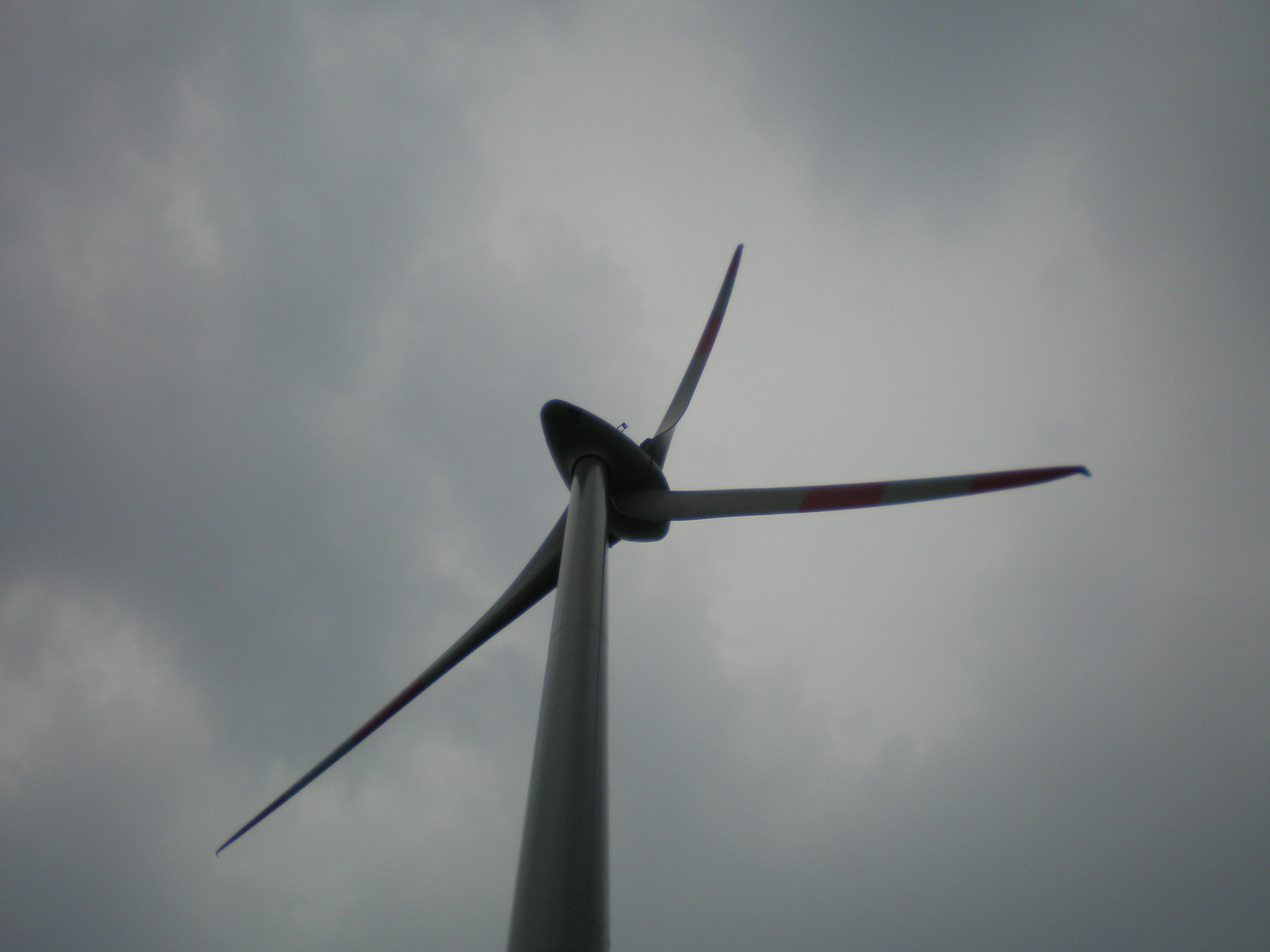 Vėjo jėgainė Lietuvoje